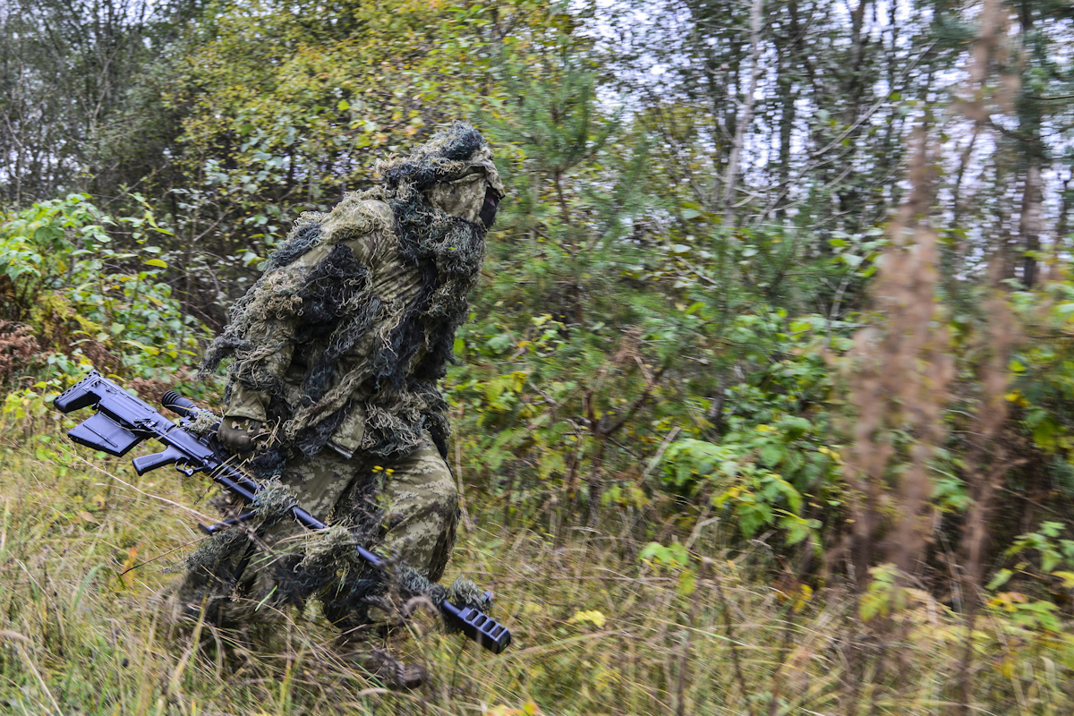 Тактико-специальные занятия со снайперами Воздушно-десантных войск России и Сил специальных операций Белоруссии (Псковская обл.)